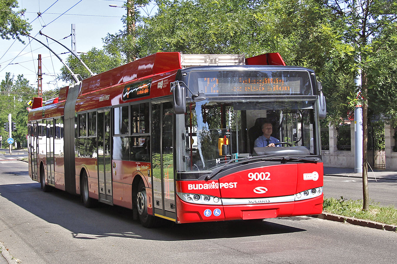 Solaris Trollino 18 típusú trolibusz a 72-es vonalon